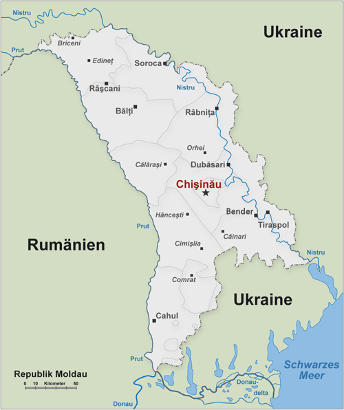 Karte von Moldawien selbstgezeichnet von Perconte, Lizenz: GNU-FDL